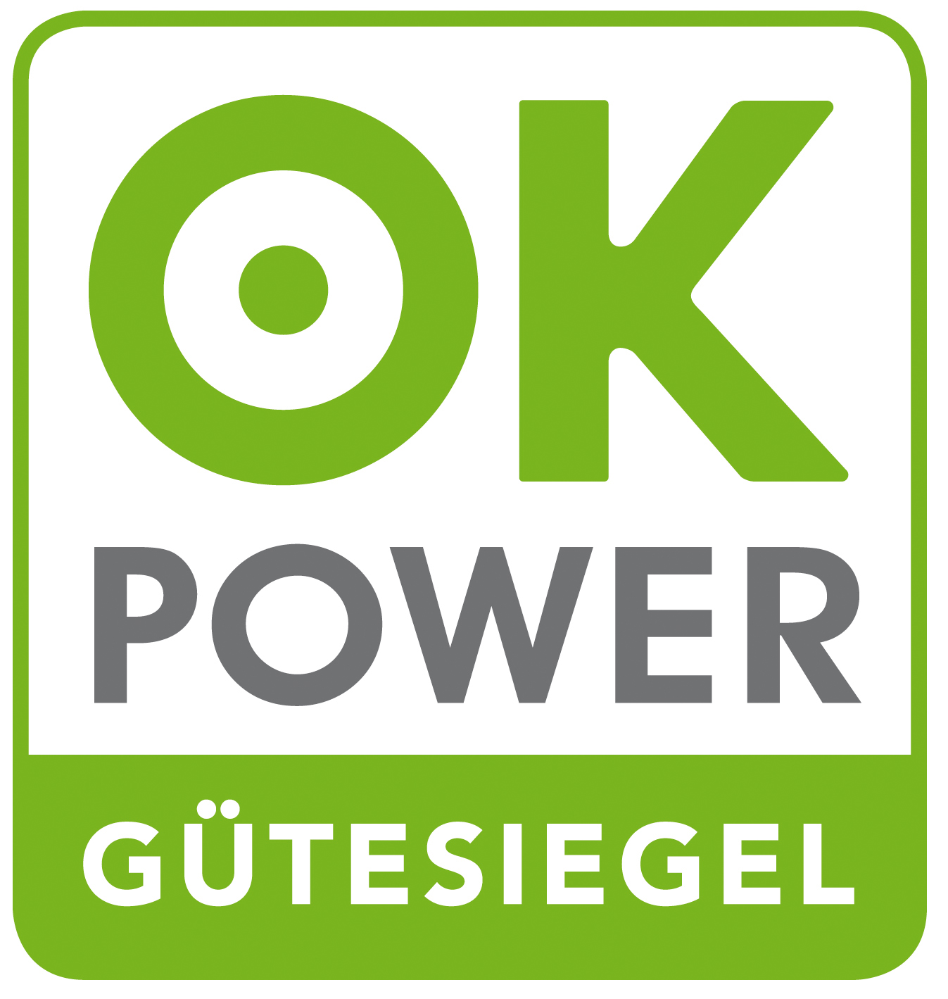 Aktualisiertes ok-power-Gütesiegel (Stand: Februar 2016)